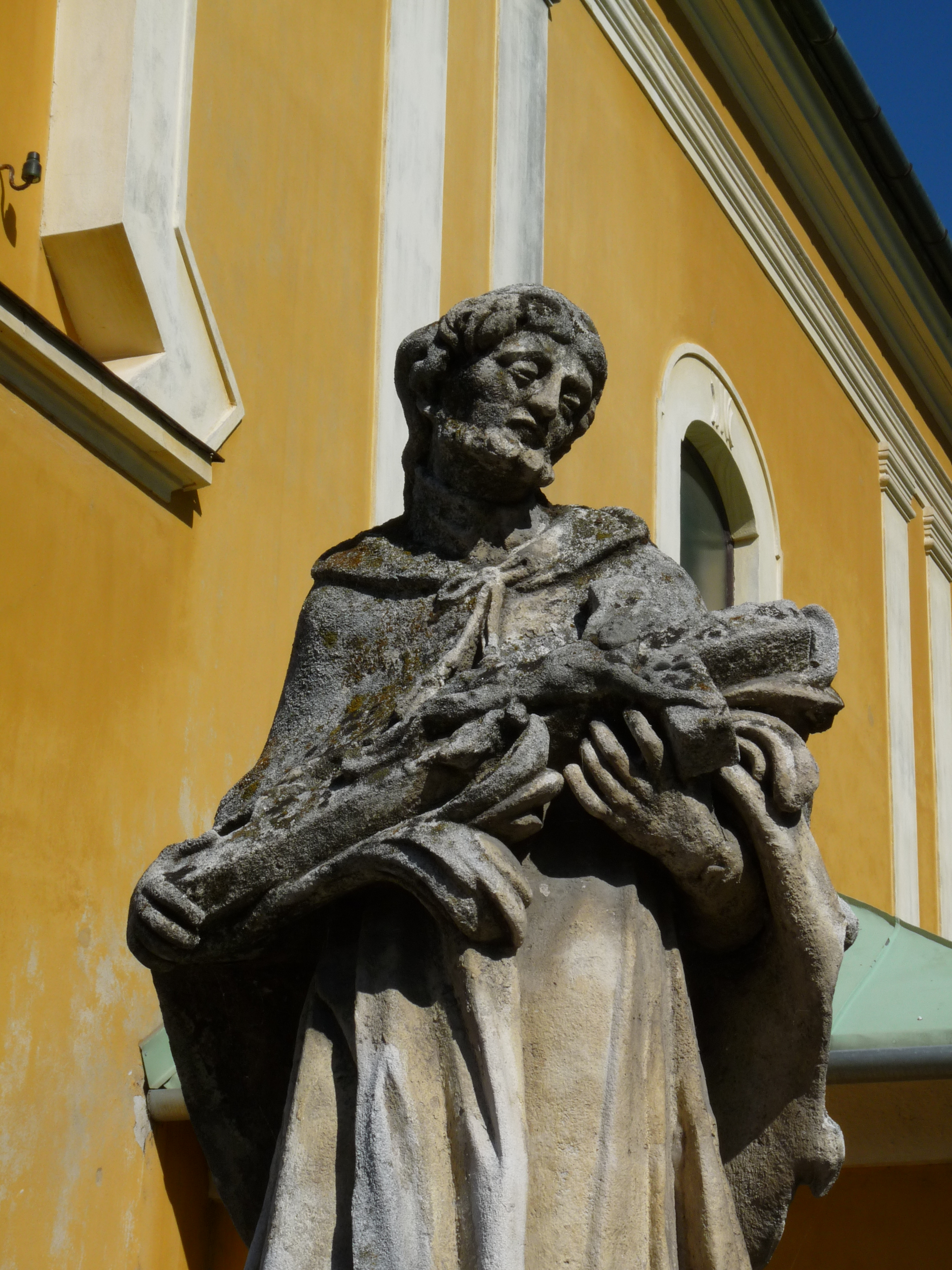 Nepumuki Szt. János szobor (Bicske, Hősök tere templom mellett) This is a photo of a monument in Hungary, Identifier: 3567